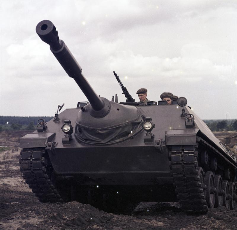 Reportage Bundeswehr Kanonenjagdpanzer, Munsterlager, KTrS III [Munsterlager, Truppenübungsplatz in der Lüneburger Heide]